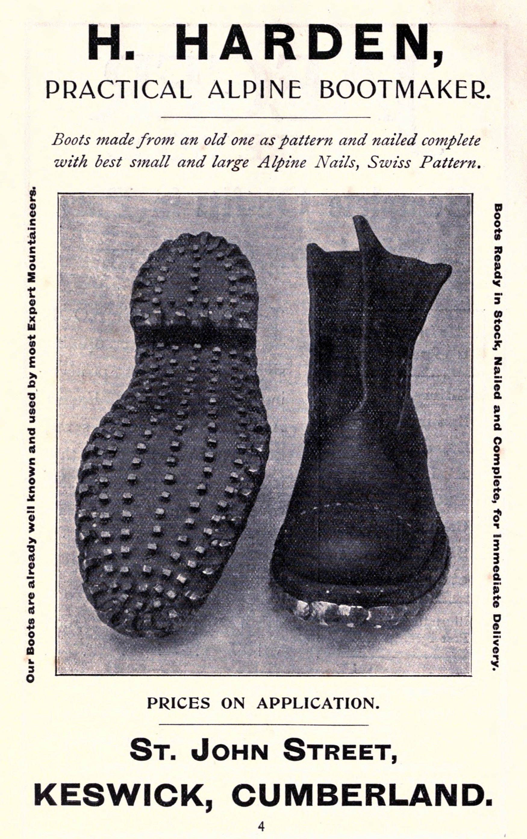 Mountaineering Boot Advertisement in 1911